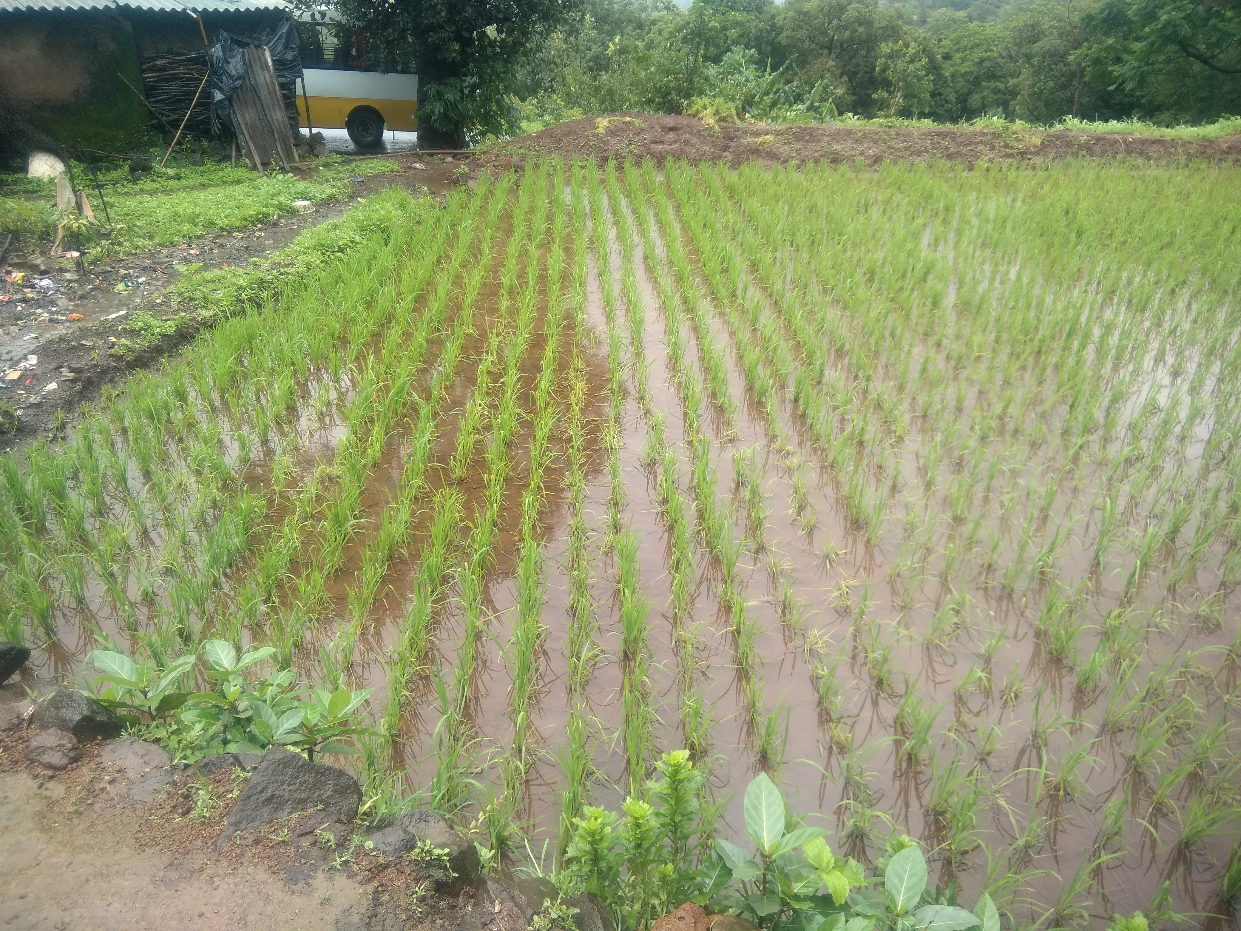 चार सूत्री भात शेतीची लागवड अशी ओळीत करतात